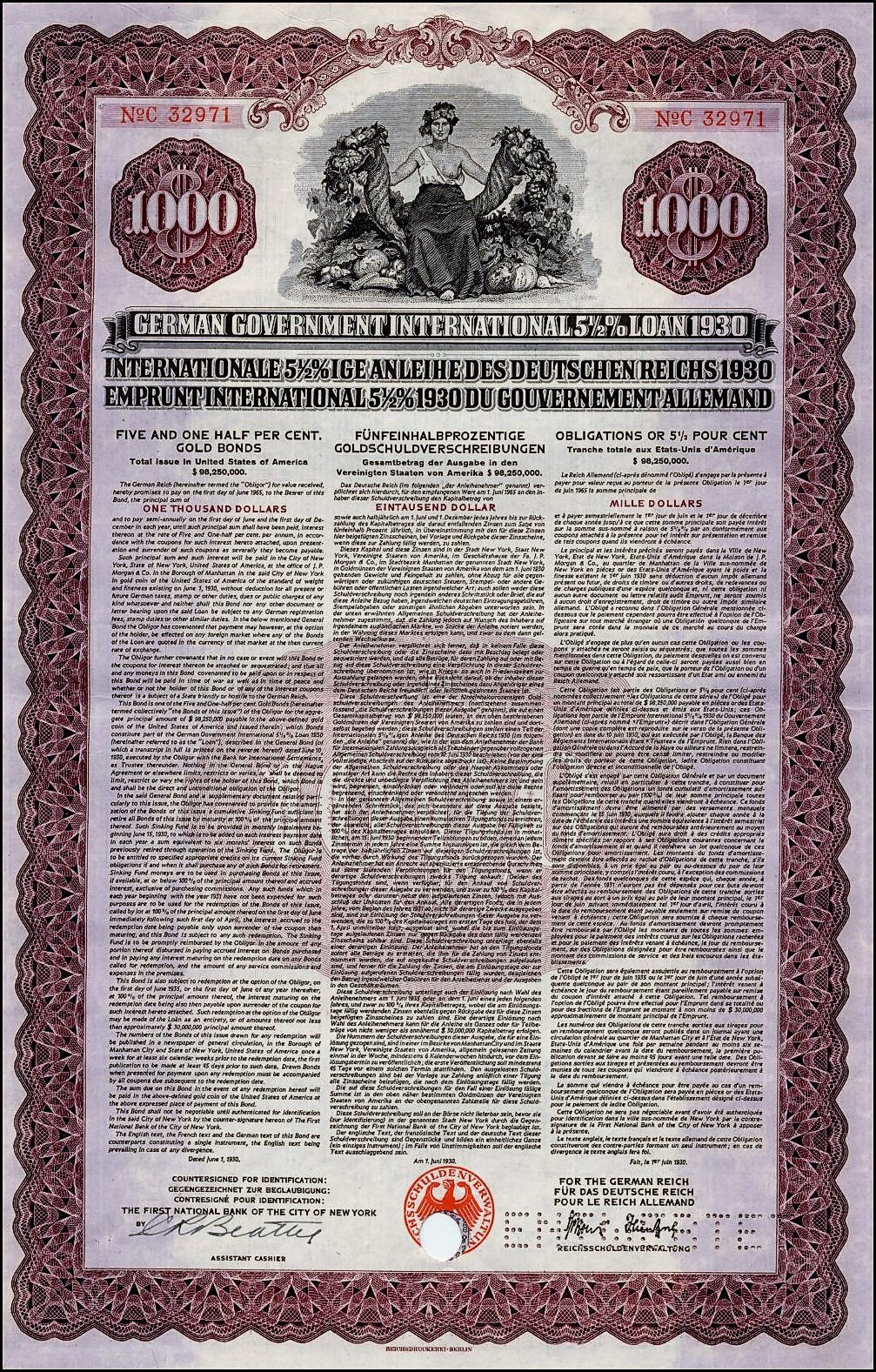 Amerikanische Tranche der Young-Anleihe: Deutsches Reich (Internationale Anleihe des Deutschen Reiches 1930 - German Government International Loan 1930) 5½% Gold Bond über 1.000 $ von 1930 – fällig am 1. Juni 1965; aus dem Fundus BARoV/ Busso Peus